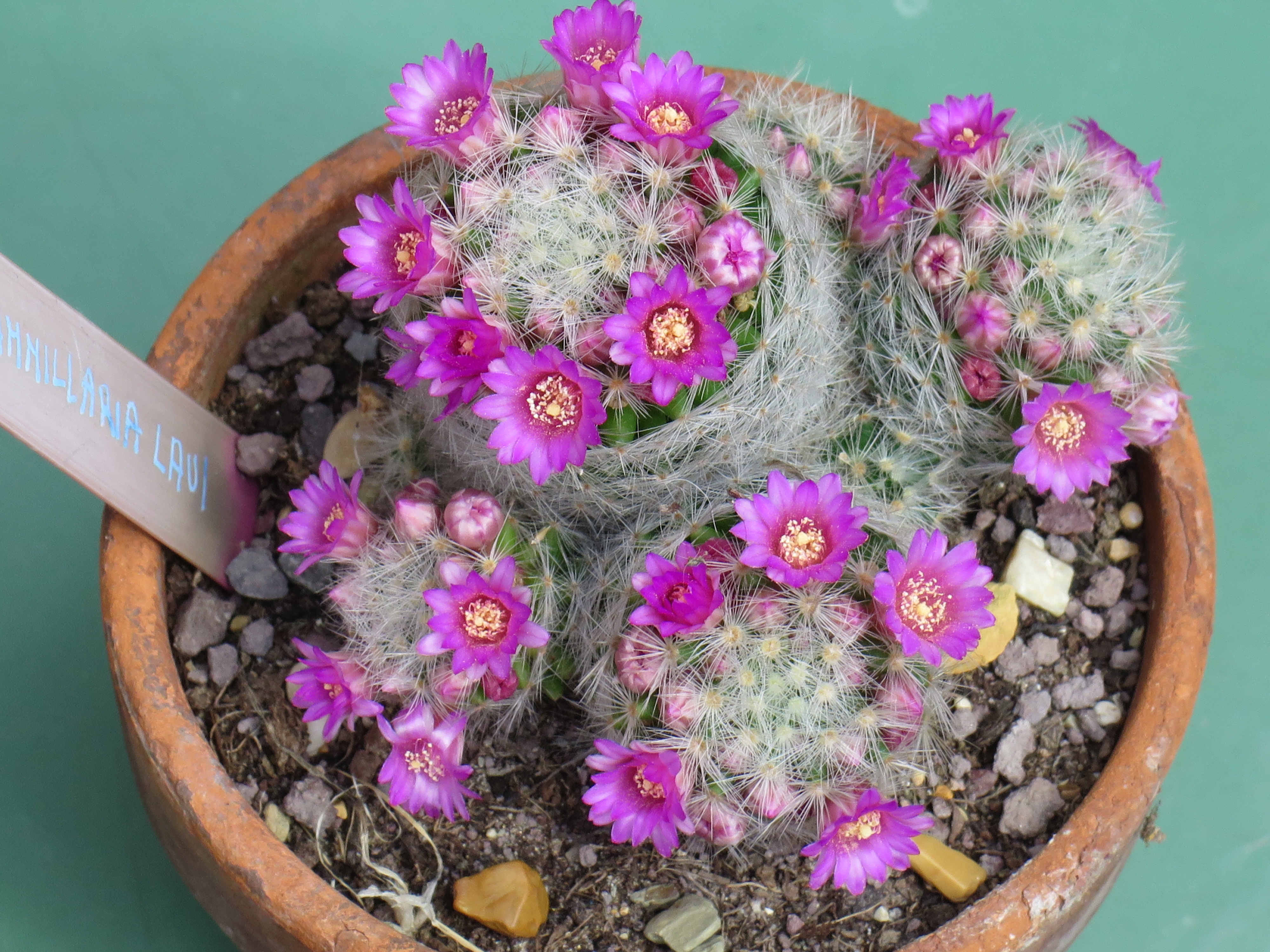 Mammillaria laui in fioritura